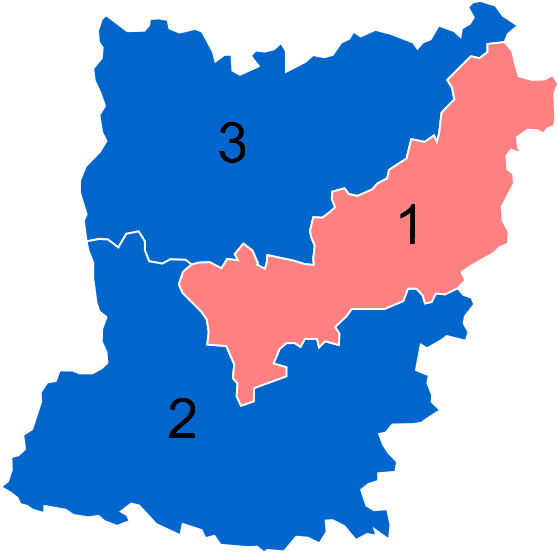 Résultats des élections législatives de la Mayenne en 2012